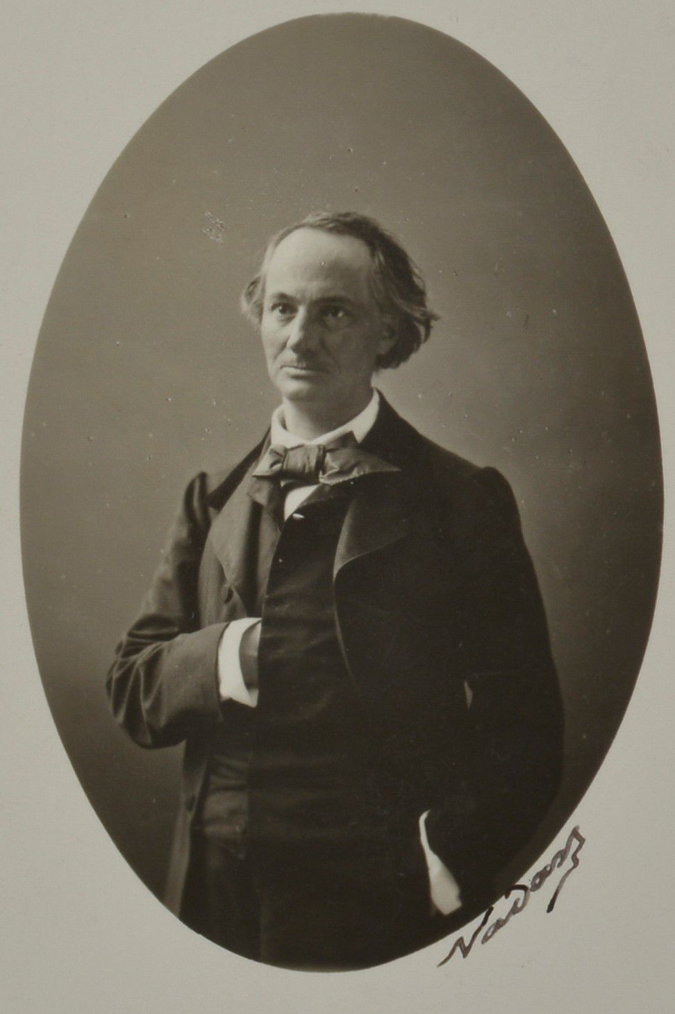 Charles Baudelaire, printemps 1862. Épreuve argentique, tirée par Paul Nadar (c. 1910-1920), signée à l'encre en bas à droite. Tampon "Portraits - Paul Nadar - Paris - 48, rue Bassano" au verso. Ovale : 9 x 6 cm. Feuille : 13,5 x 9 cm